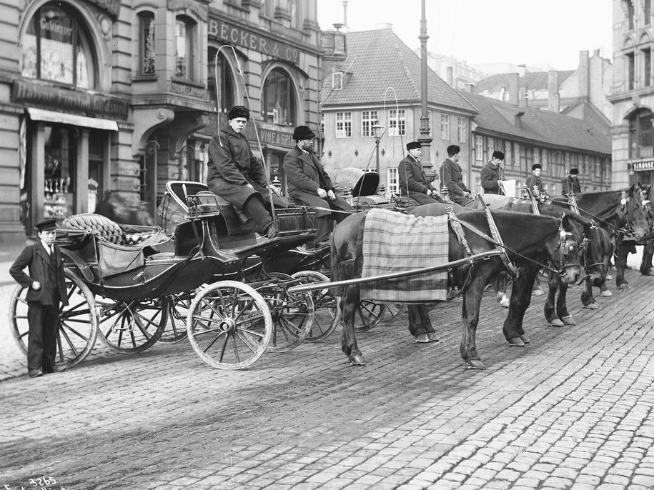 Vognmenn på Stortorget i Kristiania.